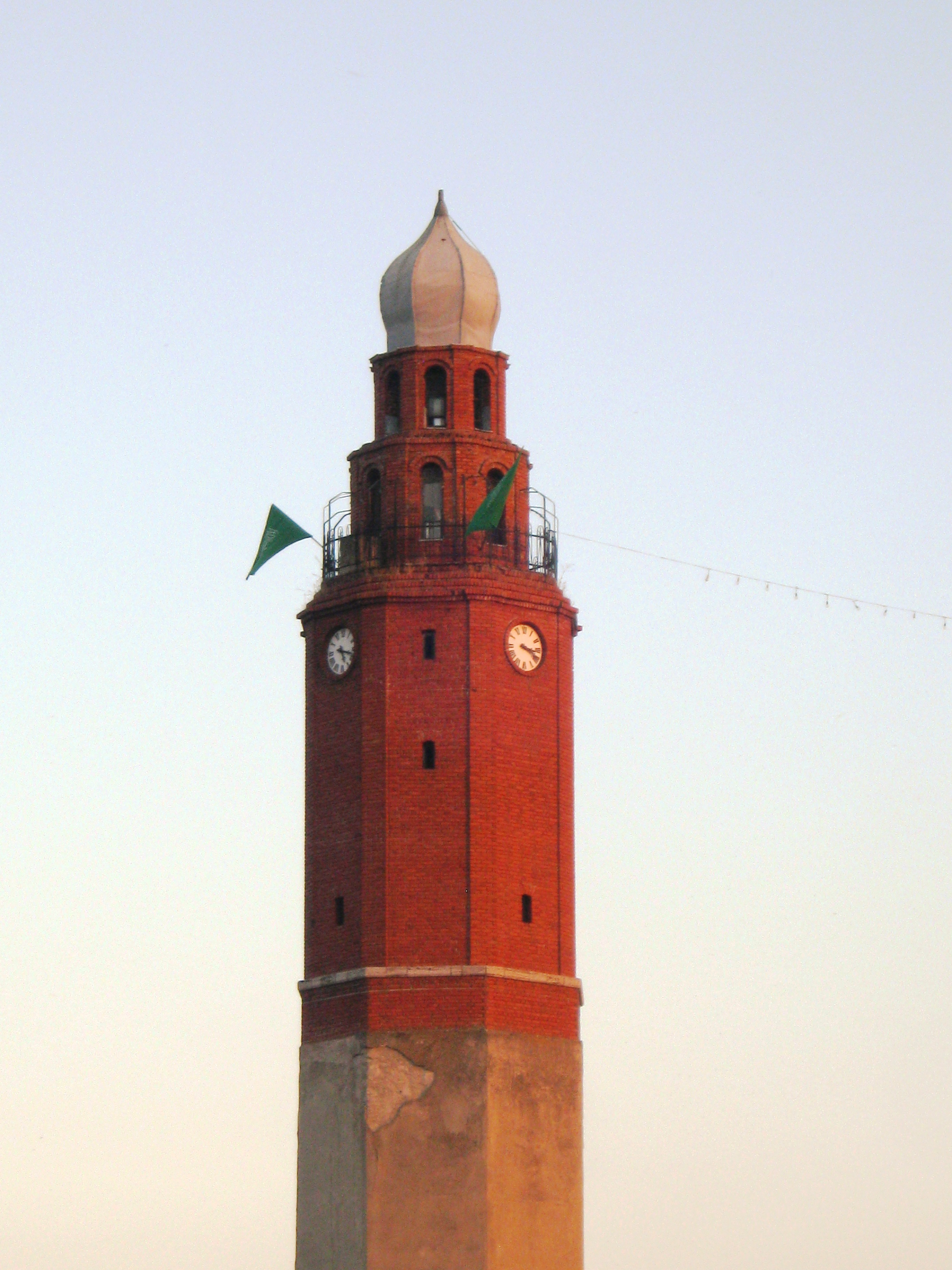 Саат-кулата во Скопје